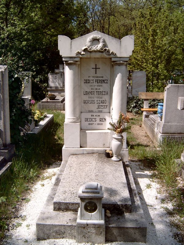 Dedics Ferenc (1879-1929), repülőmotorok gyártója testvérével Dedics Kálmánnal 1905-ben nyitotta meg autó- és motorjavító üzemét Budapesten. 1909-től repülőmotorokat gyártottak. Új köztemető: 17/5-1-55.